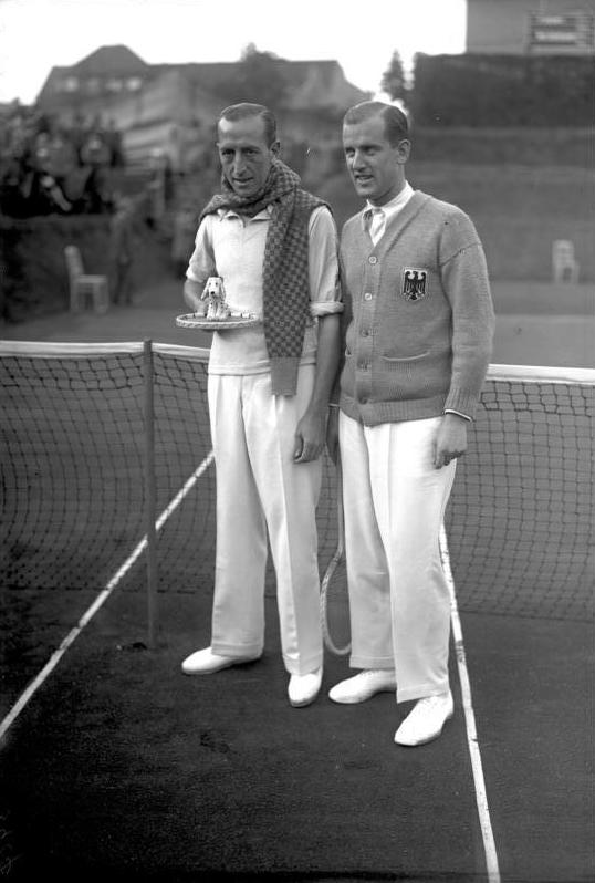 Ein deutscher Sieg im Dawis-Pokal! Moldenhauer (rechts) der große deutsche Tennisspieler schlug auf den Plätzen des Berliner Schlittschuhclubs am Reichskanzlerplatz überlegen den spanischen Tennismeister Flaquer.